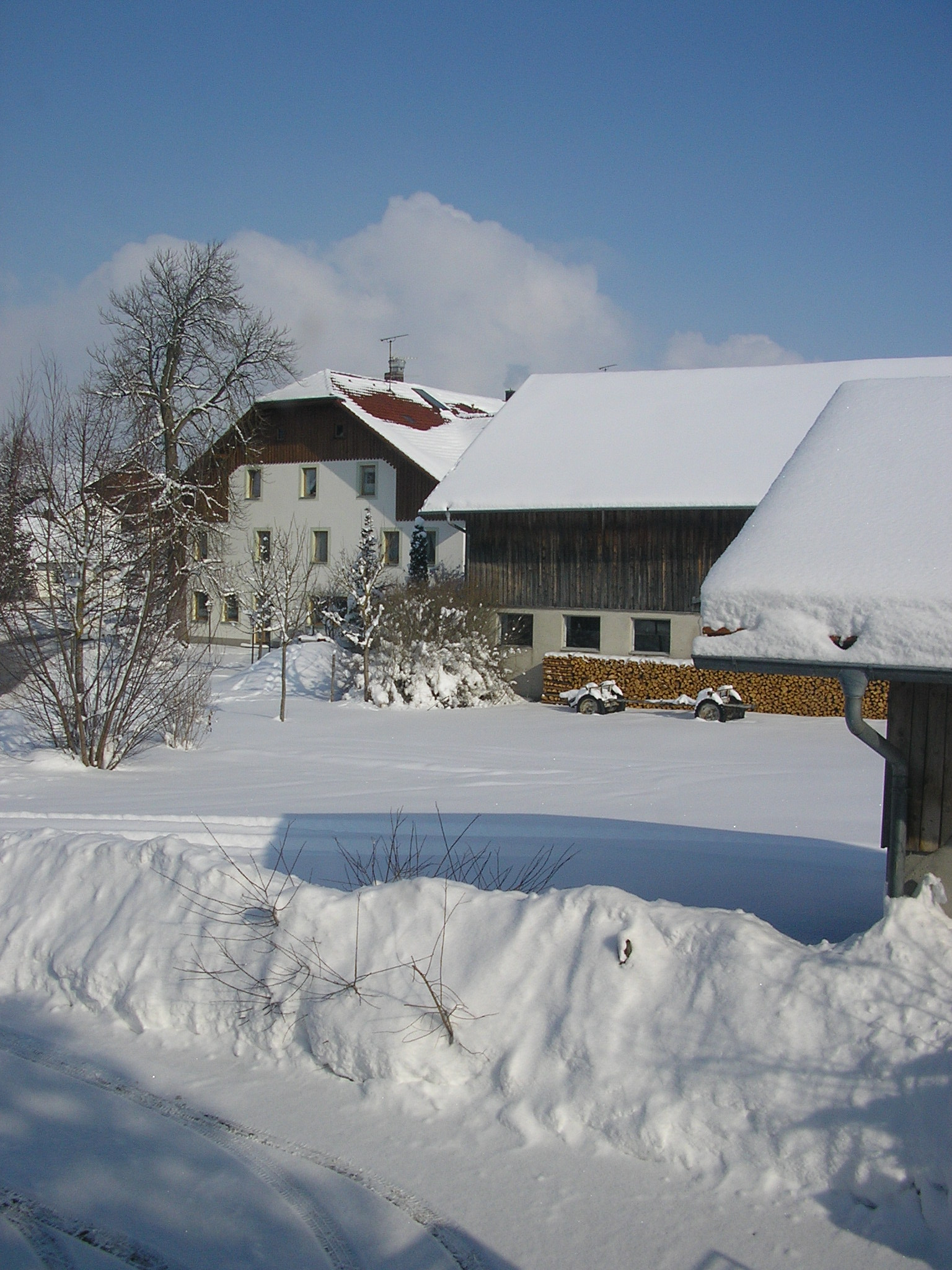 Winter 2004 in Schwabbruck